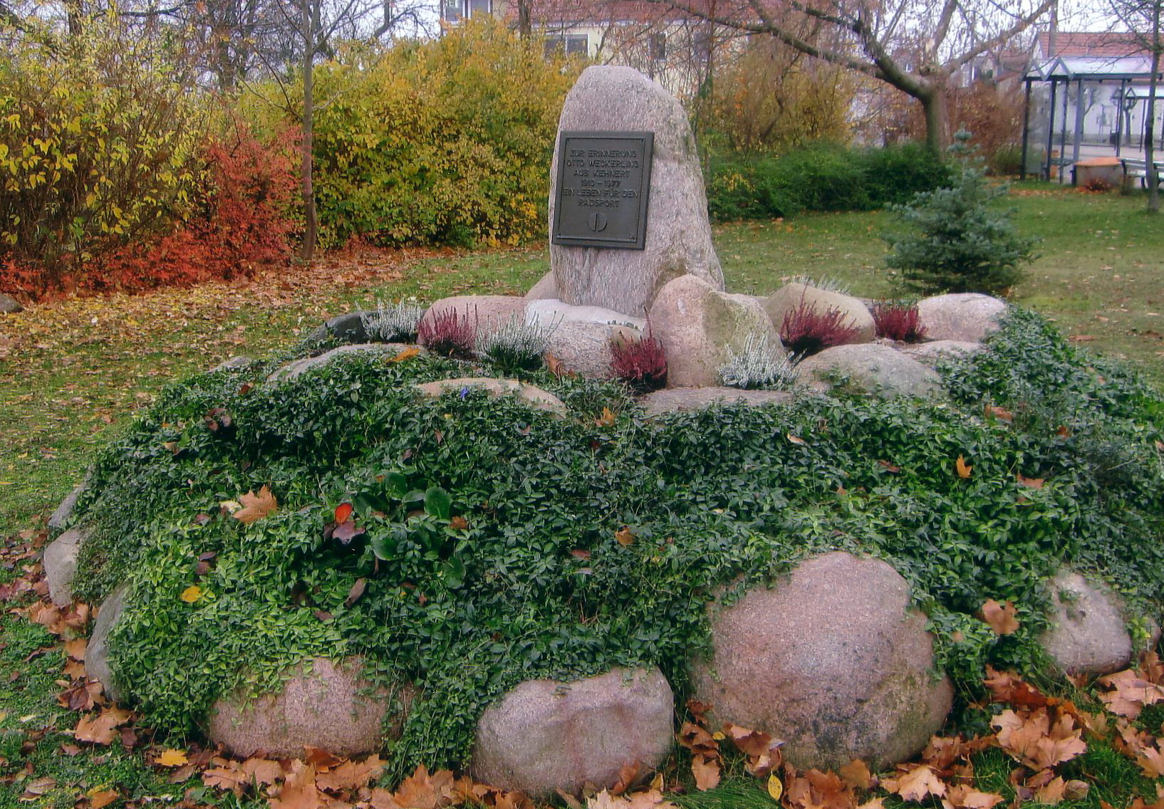 Gedenkstein für Otto Weckerling in Kehnert am Rande des Elberadwegs